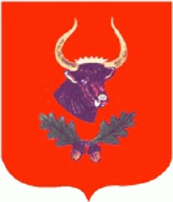 Herb Jaktorowa